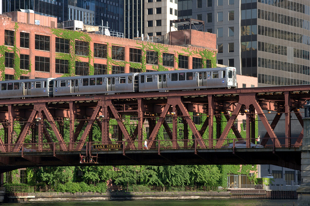 'L' train